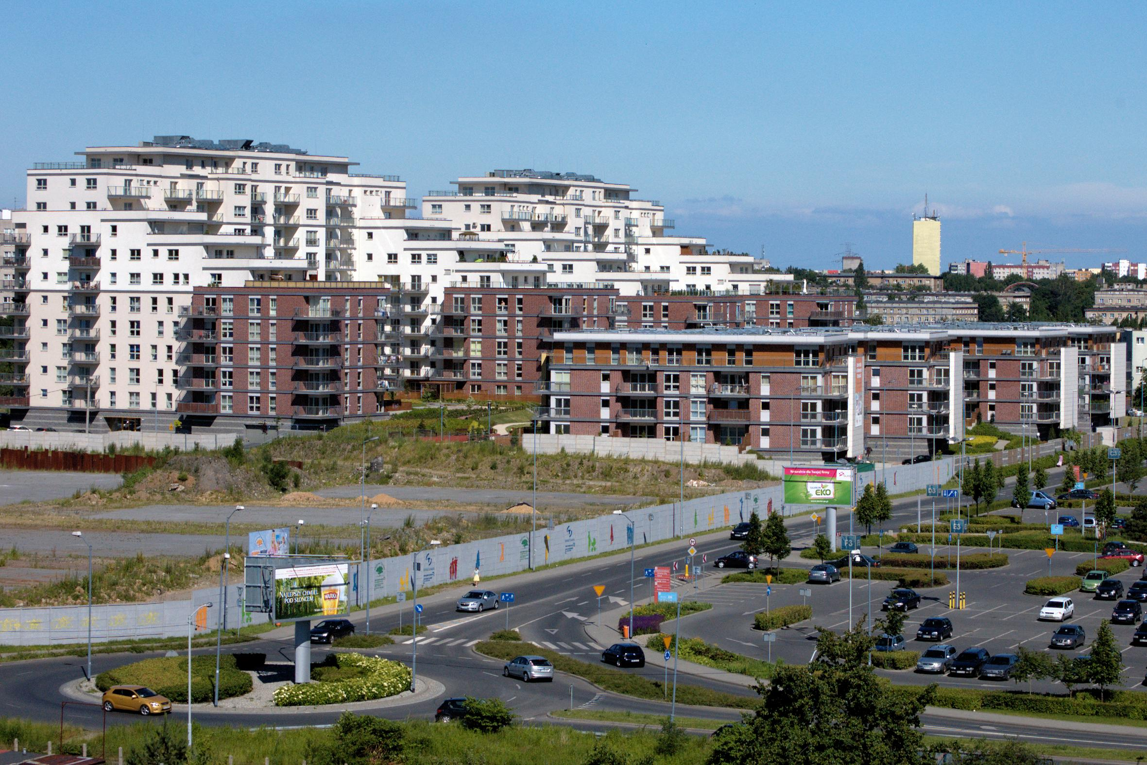 Katowice osiedle Dębowe Tarasy. Przykład co można zrobić z terenami poprzemysłowymi i hałdami. KAtowice - Oak Terraces, an example how postmining dust piles can be revitalized.